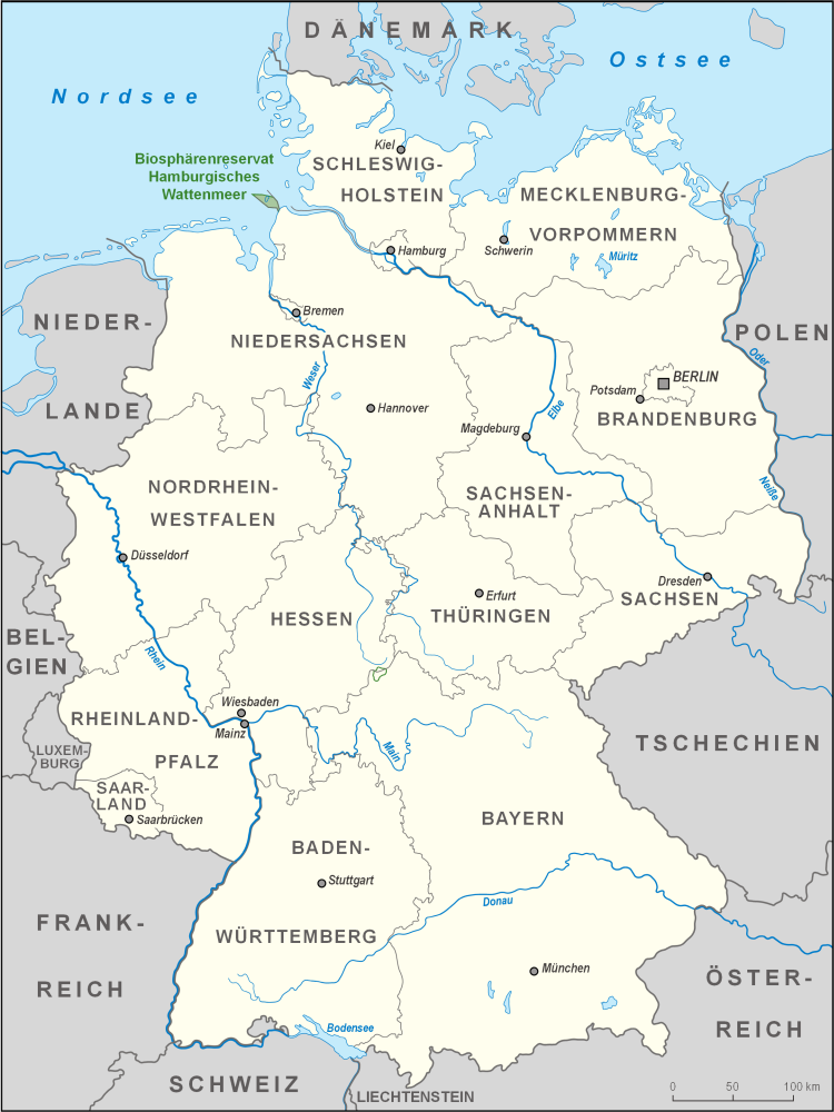 Karte des Biosphärenreservates Hamburgisches Wattenmeer in Deutschland